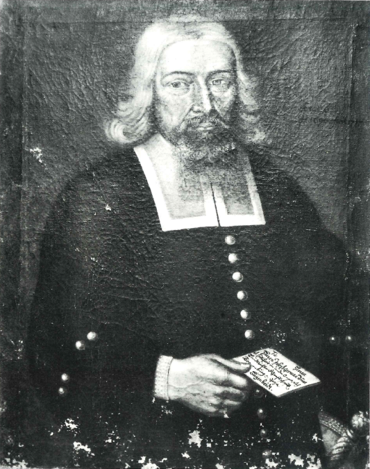 Landrichter Joseph Germann, 1629–1690, Ammann und Commissar im unteren Toggenburg, Ölgemälde im Toggenburger Museum Lichtensteig